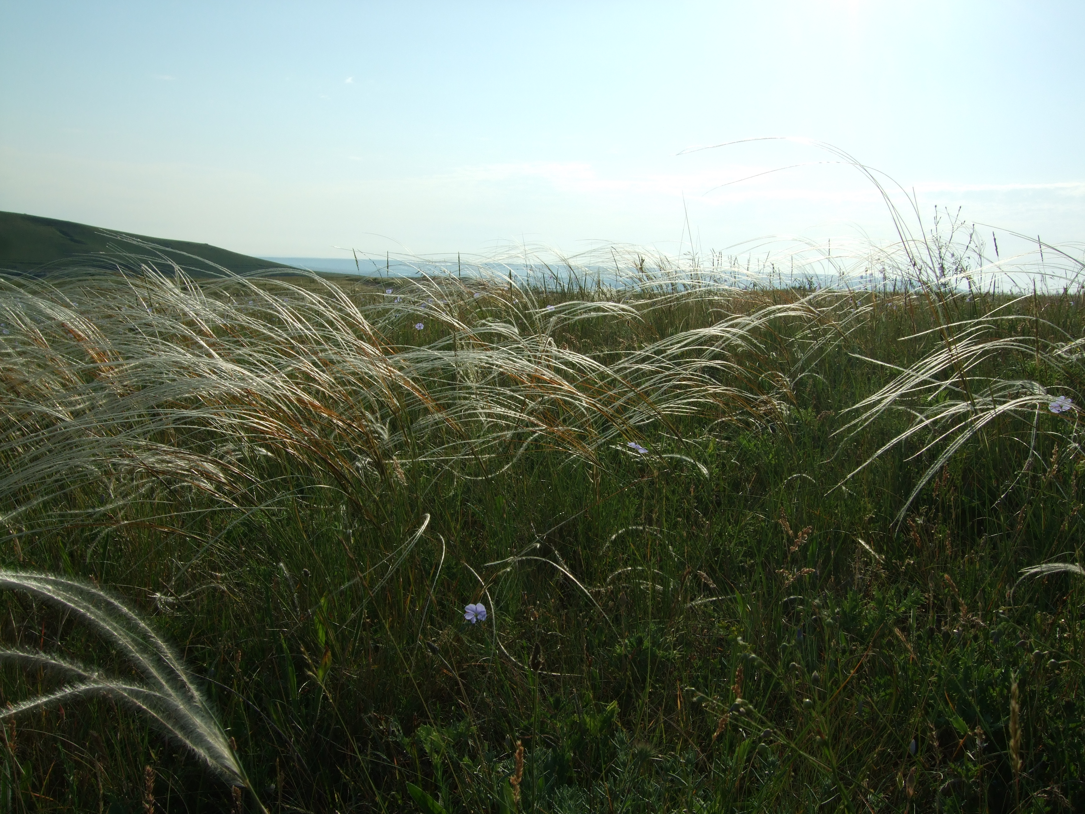 Гора Ак-Кая, Білогірський р-н, с. Біла Скеля